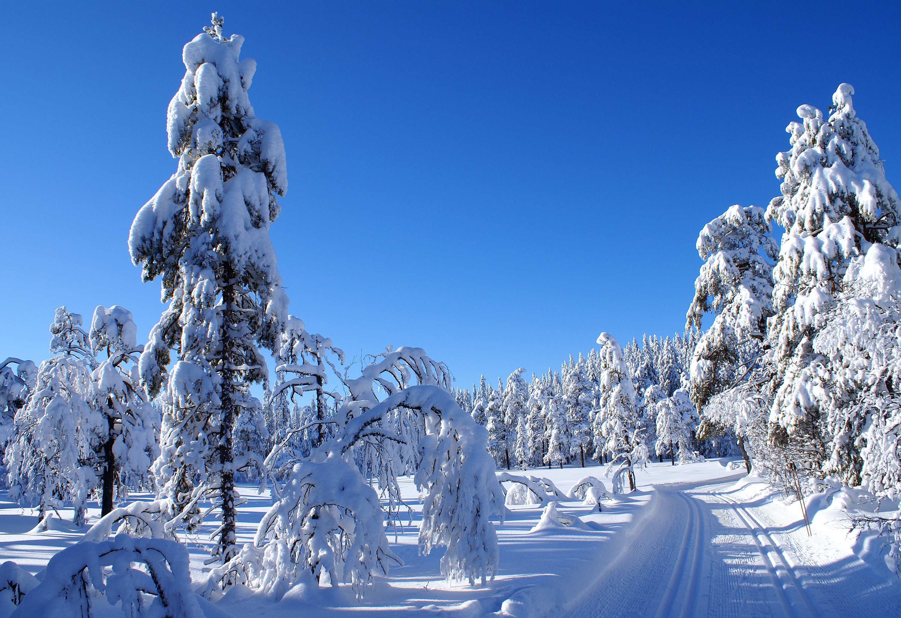 Another photo from Krokskogen, taken between Sørsetra and Finneflaksetra